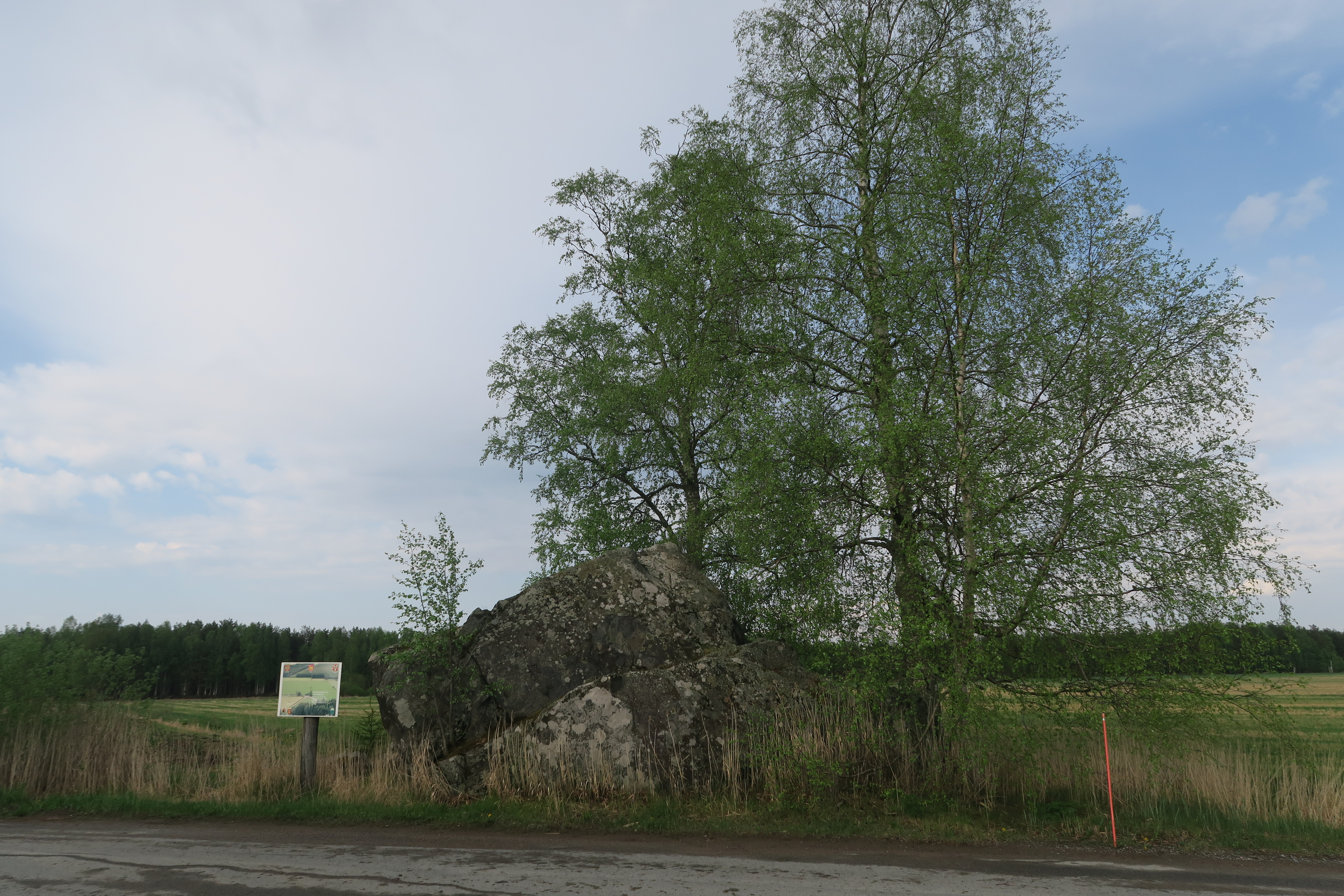 Satulinkivi eli Vahankivi, siirtolohkale ja rajakivi Jokioisten, Someron ja Tammelan kuntien rajalla, samalla myös Kanta-Hämeen ja Varsinais-Suomen nykymaakuntien rajalla.